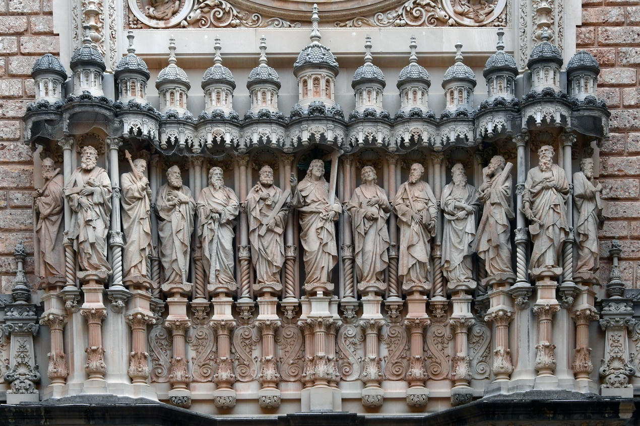 Eingang Monestir Santa Maria de Montserrat